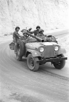 ציידי נ"ט בבקעת הירדן.